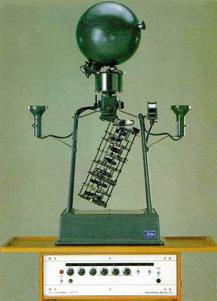 Planétarium Goto-E5